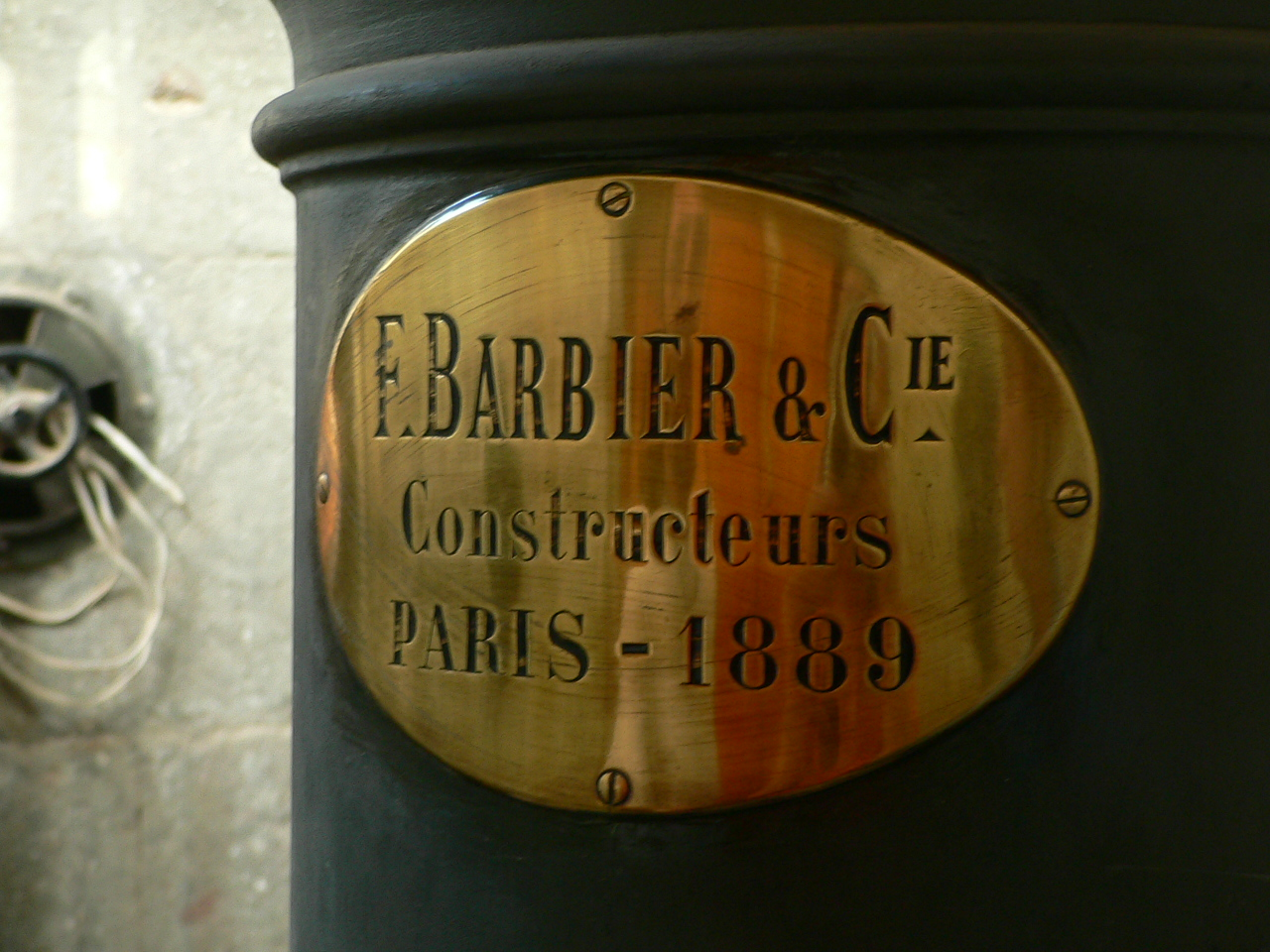 Detalle del basamento del grupo óptico. Faro de Maspolomas. Gran Canaria. Islas Canarias.